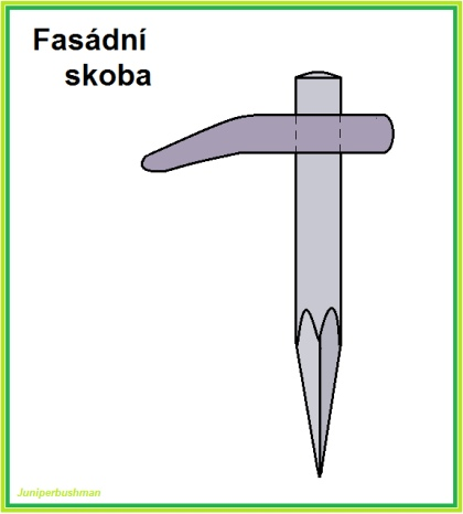 Nákres fasádní skoby